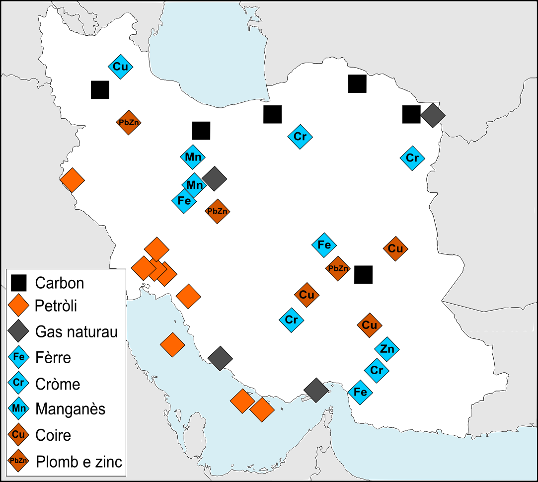 Ressorsas naturalas d'Iran.